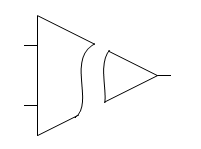 Amplificador de aislamiento Imagen creada por el usuario Murphy sujeta a las condiciones de la licencia GFDL.